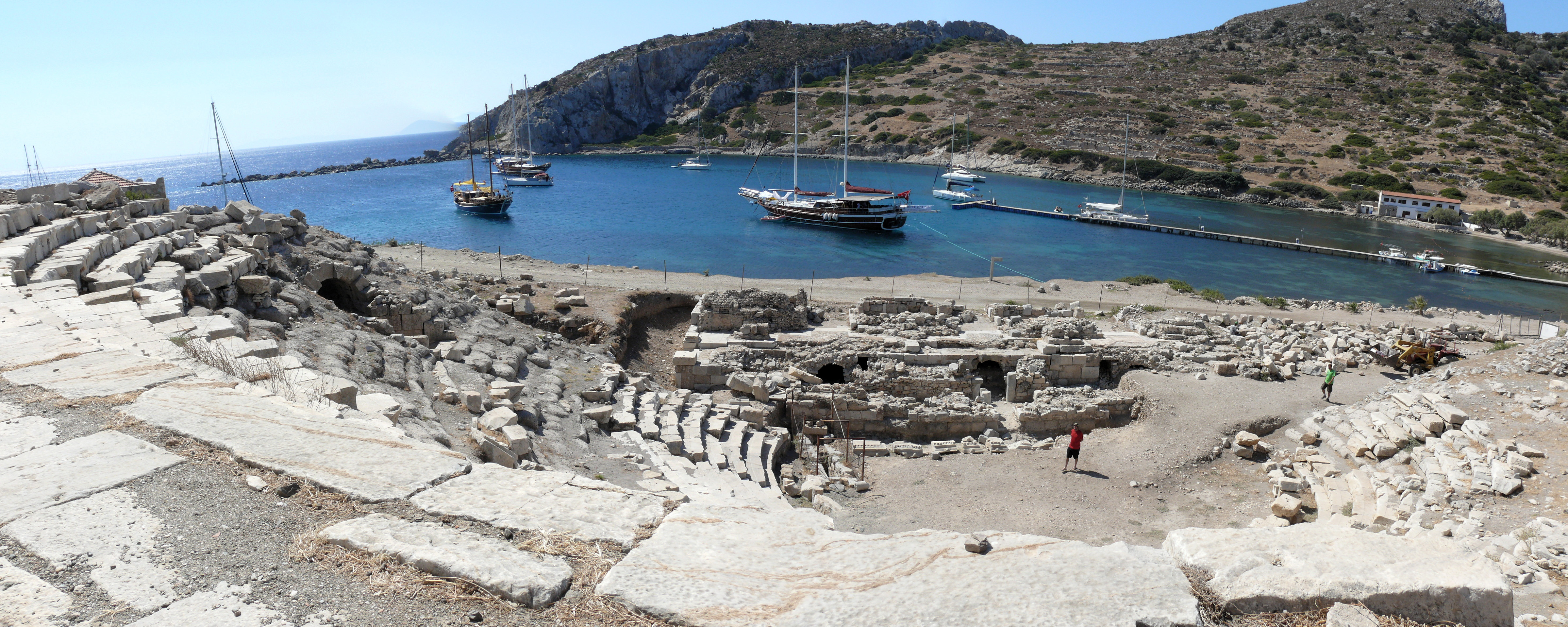 Vue de Cnide depuis le petit théatre (photo prise vers le sud-ouest du site).